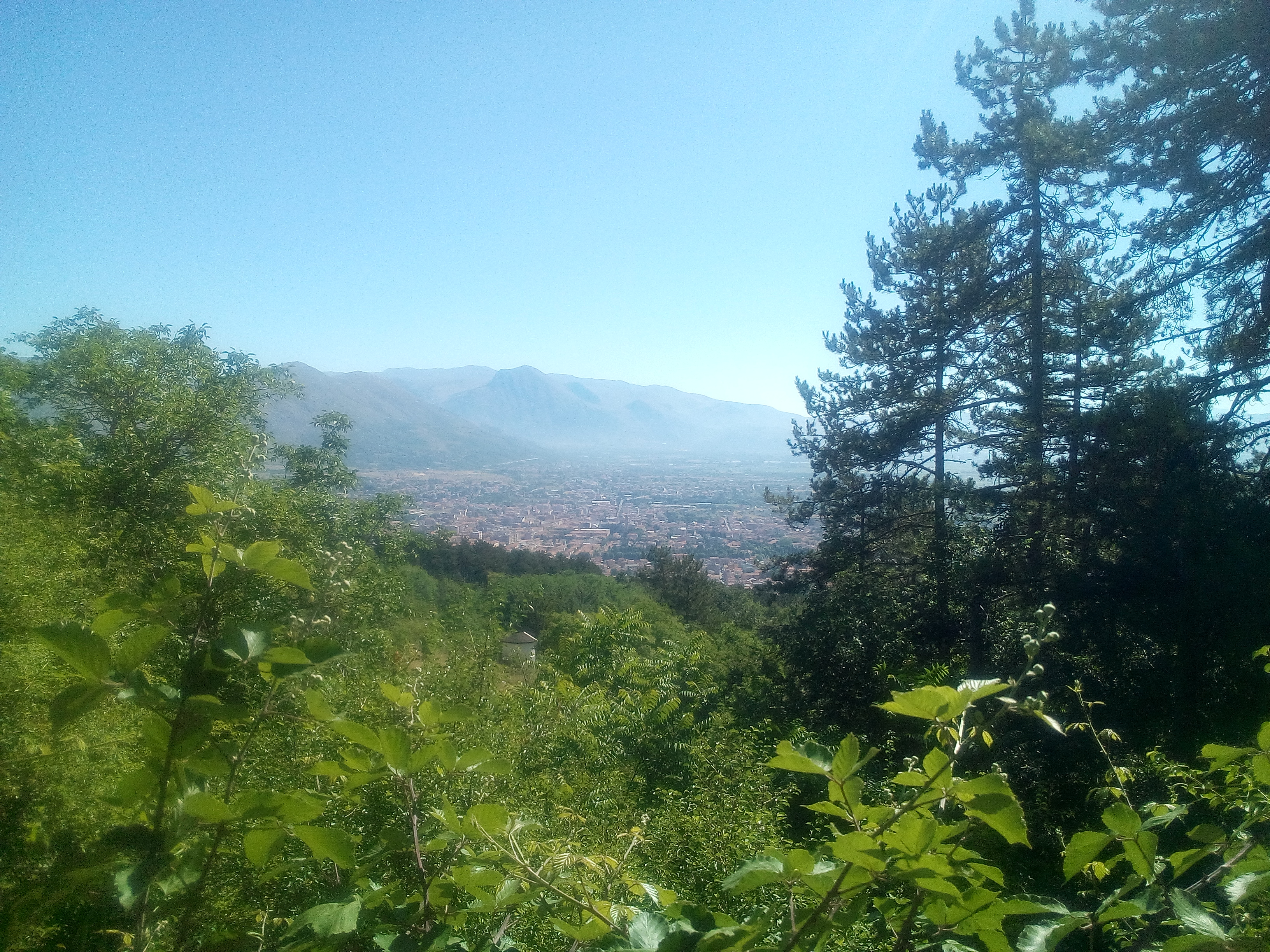 Veduta di Avezzano, Abruzzo